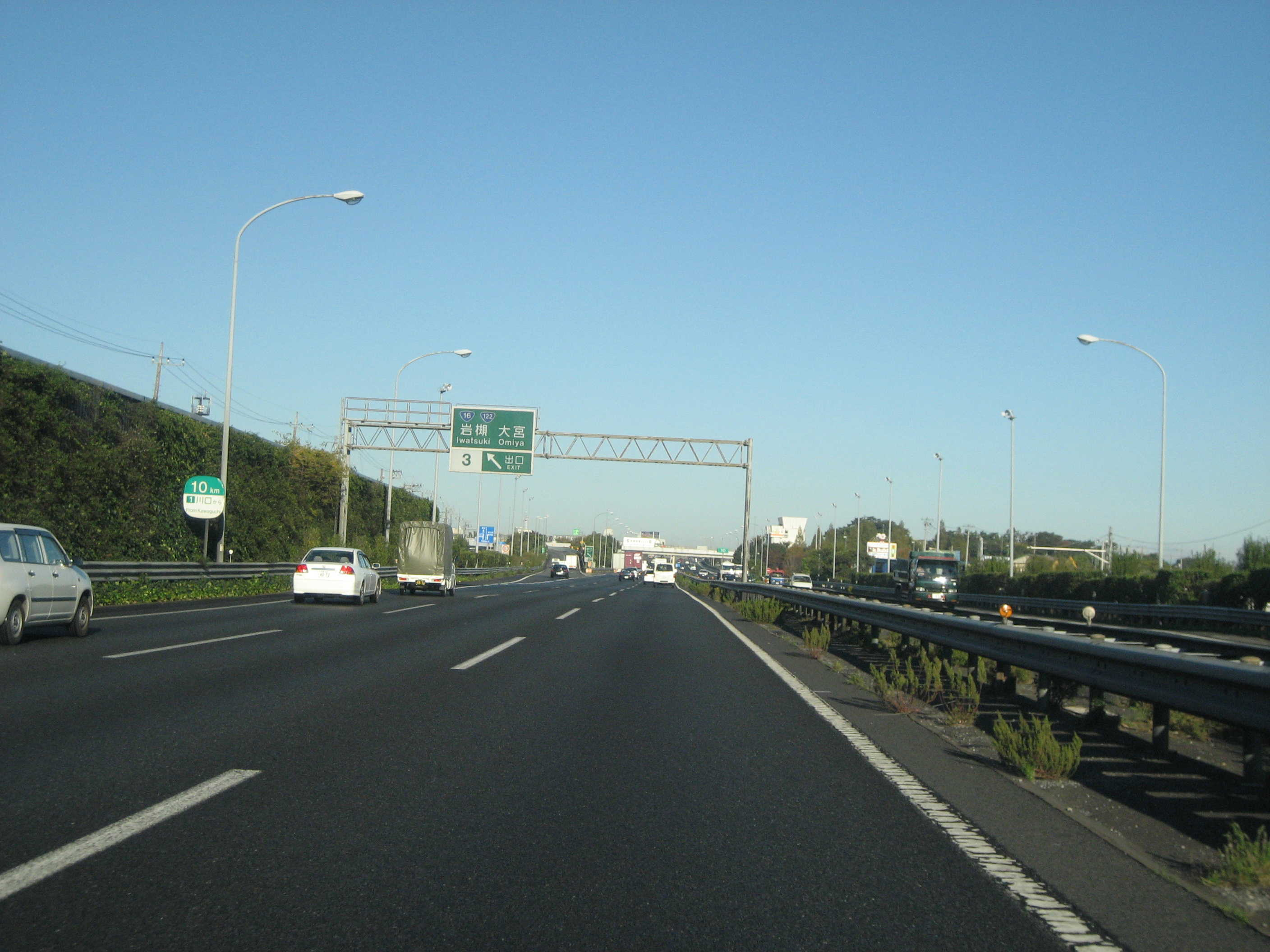 岩槻インター出口